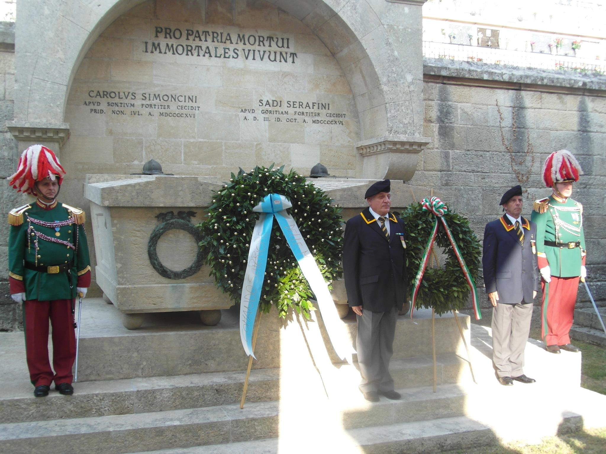 Commemorazione in ricordo di Carlo Simoncini e Sady Serafini, 6 luglio 2016